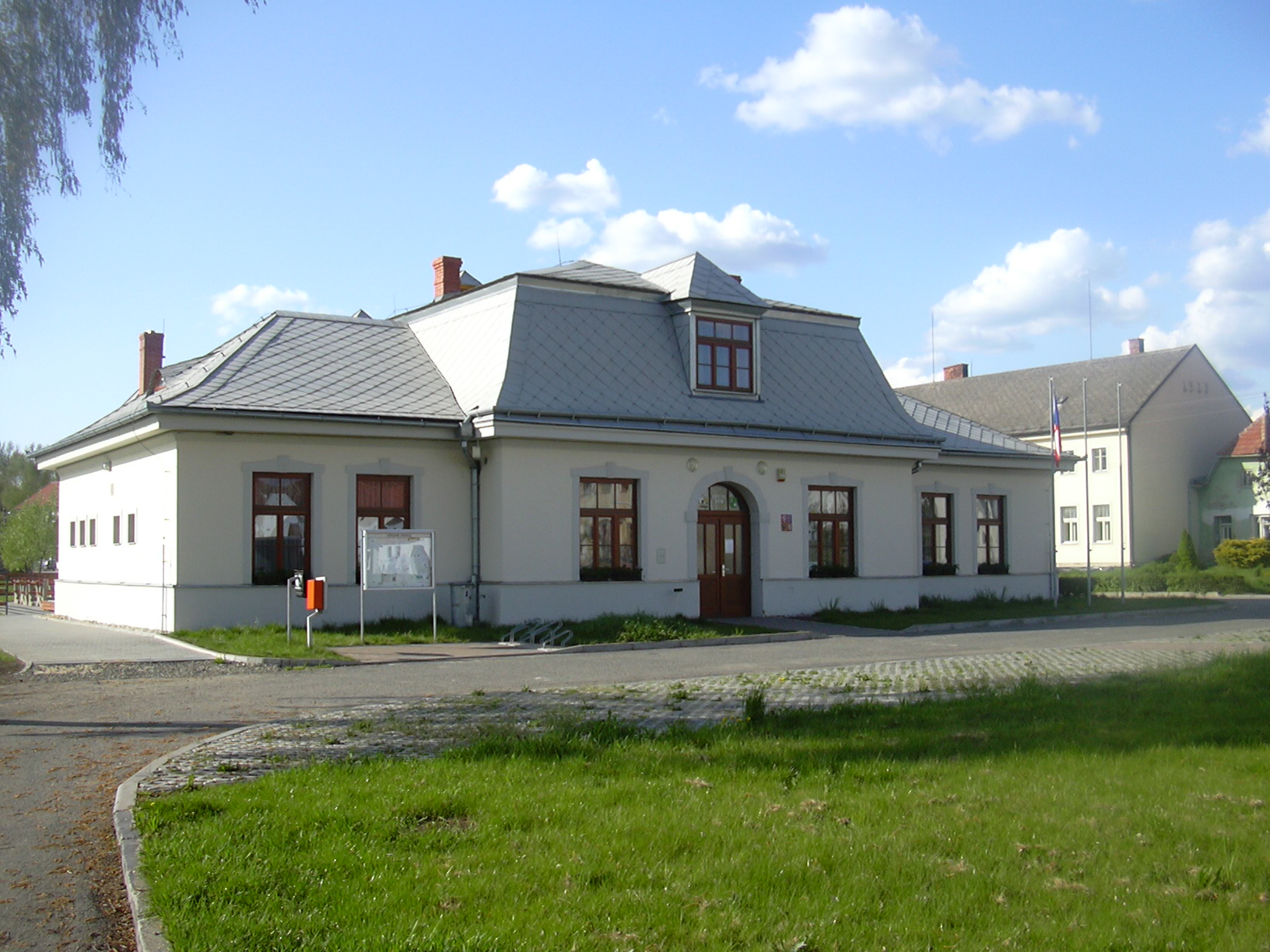 Obecní úřad Rostěnice-Zvonovice (Vyškov District - Czech Republic)